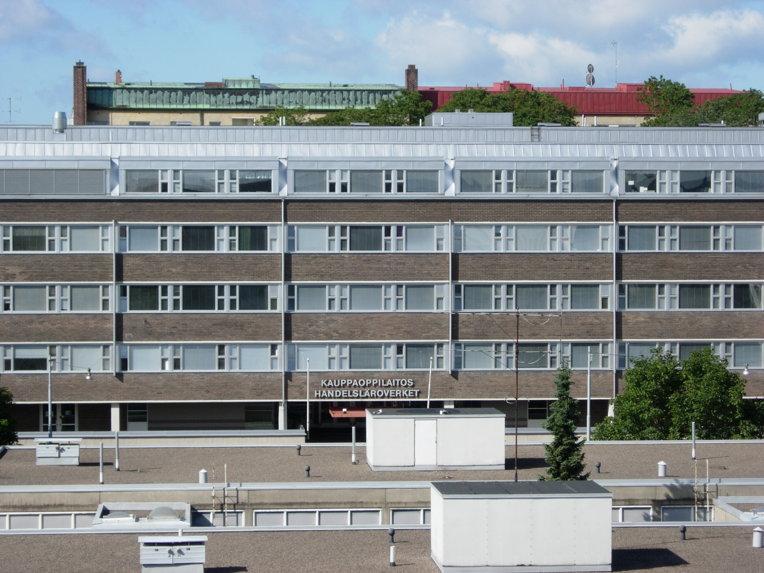 Turun kauppaoppilaitos, nykyään osa Turun ammatti-instituuttia.